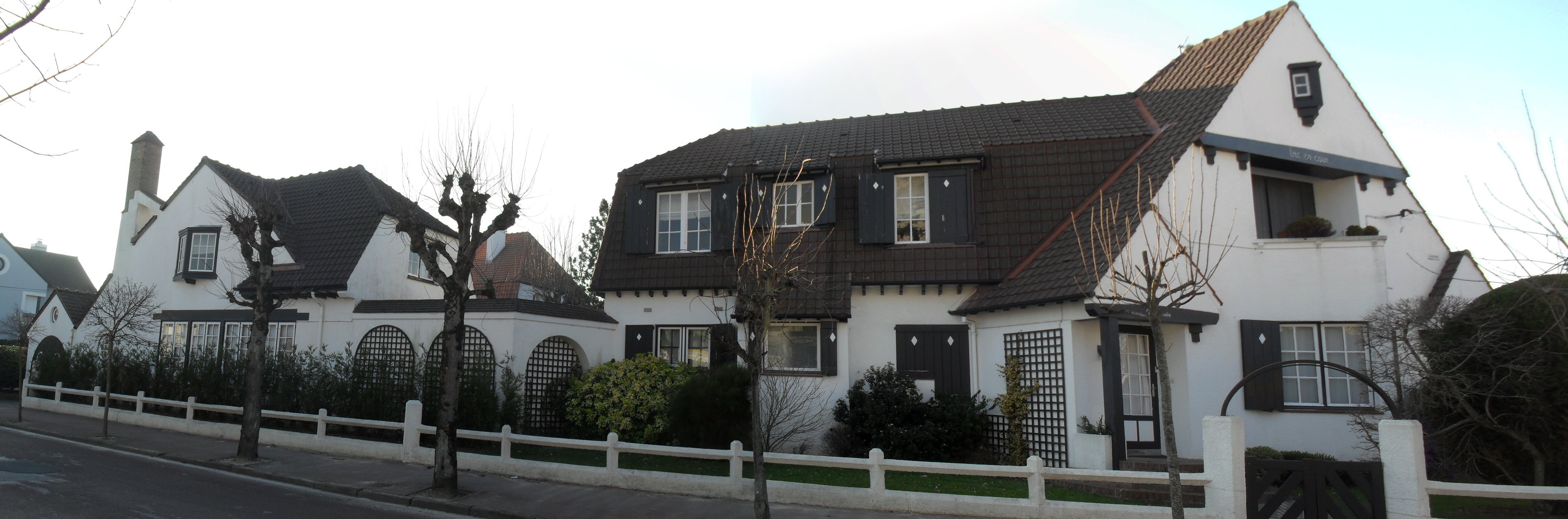 Villa Bic en Coin, Avenue Joseph Duboc, Avenue des 3 Martyrs, Avenue des Phares - Le Touquet-Paris-Plage Architecte : Louis QUETELART Date : 1925 "Préservation en raison de l'originalité du plan et du vocabulaire architectural caractéristiques de l'architecture Louis QUETELARD" (Description provenant du site de la ville)